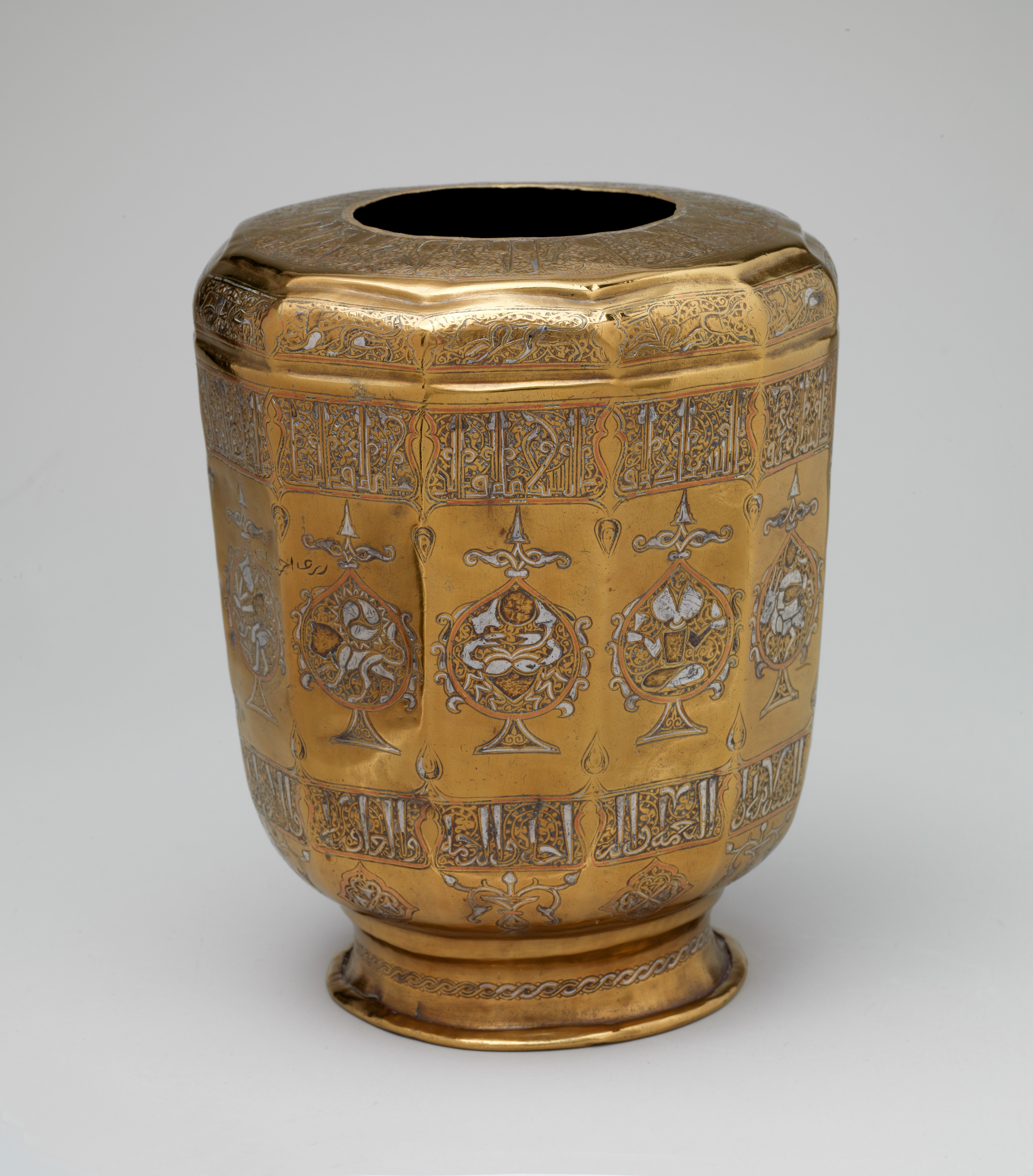 Ewer base; Metal